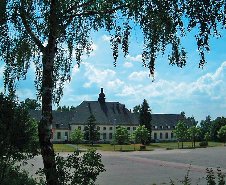 Ehemaliges Offizier-Kasino im Truppenlager mit Hauptplatz (vormals Adolf-Hitler- bzw. Eisenhower-Platz), Truppenübungsplatz Wildflecken.